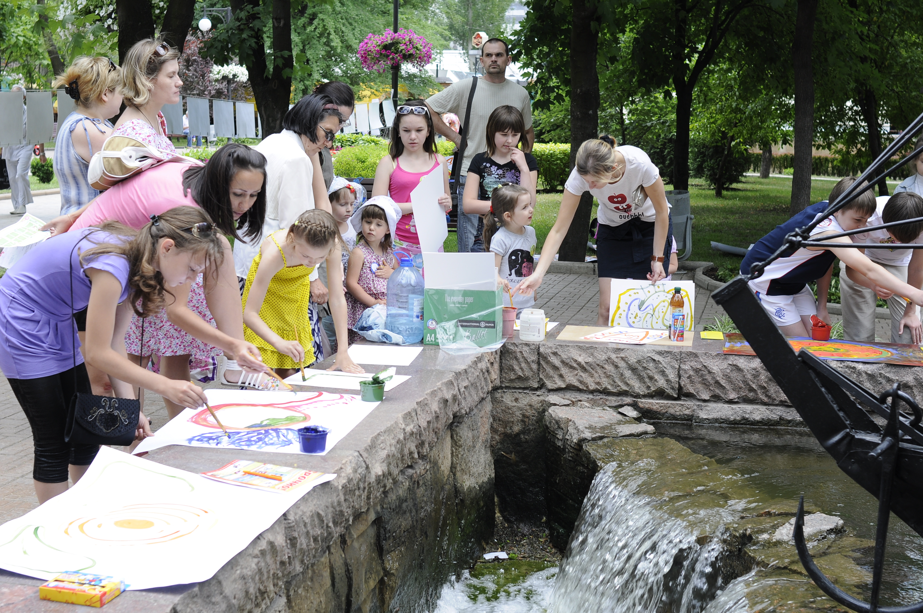 Городской экологический праздник в Донецке в честь Всемирного дня окружающей среды